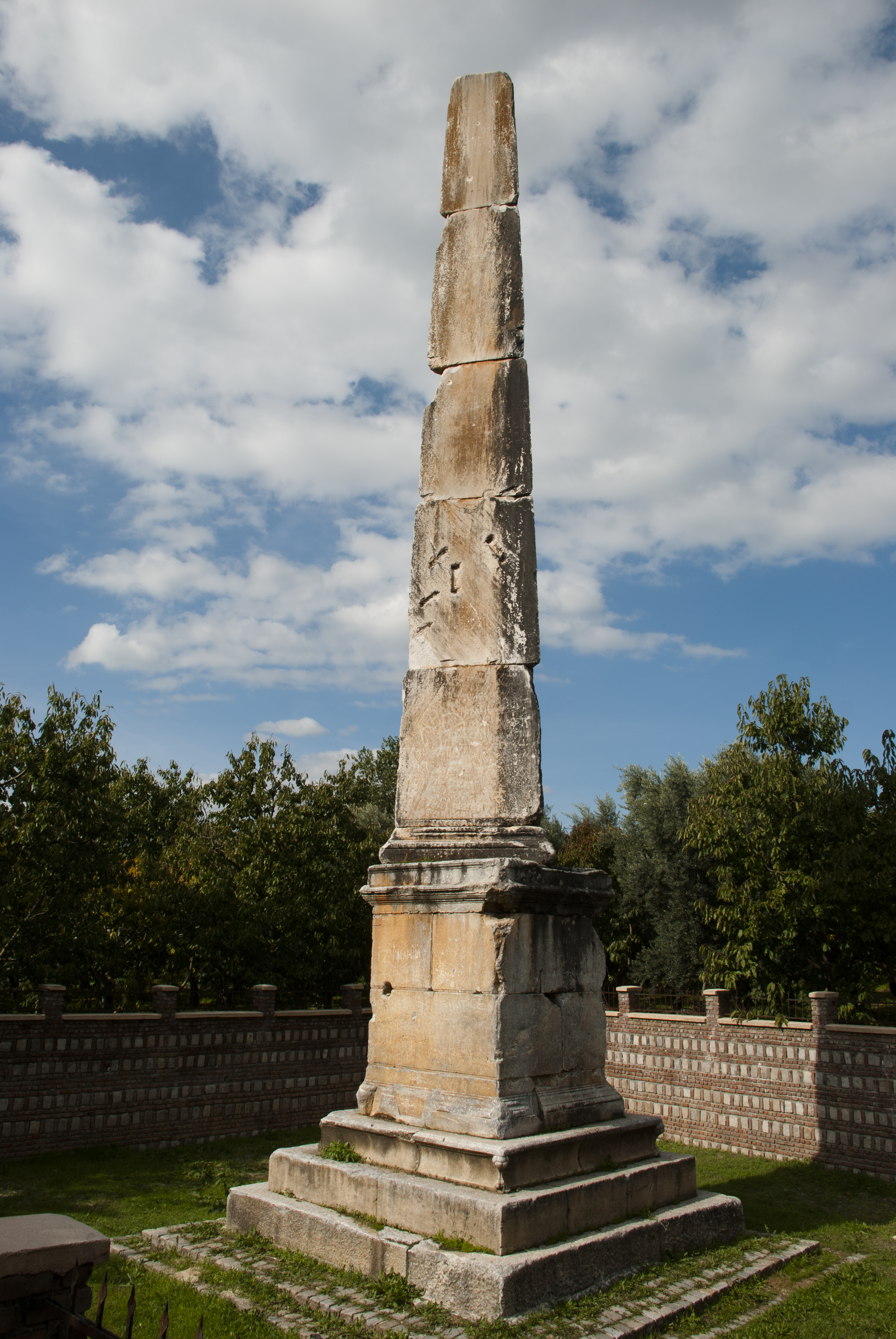 1. yüzyıldan kalma Roma kökenli "C. Casius Philiscus" adına yapılmış bir dikilitaştır. Bursa, İznik, Elbeyli Köyü.